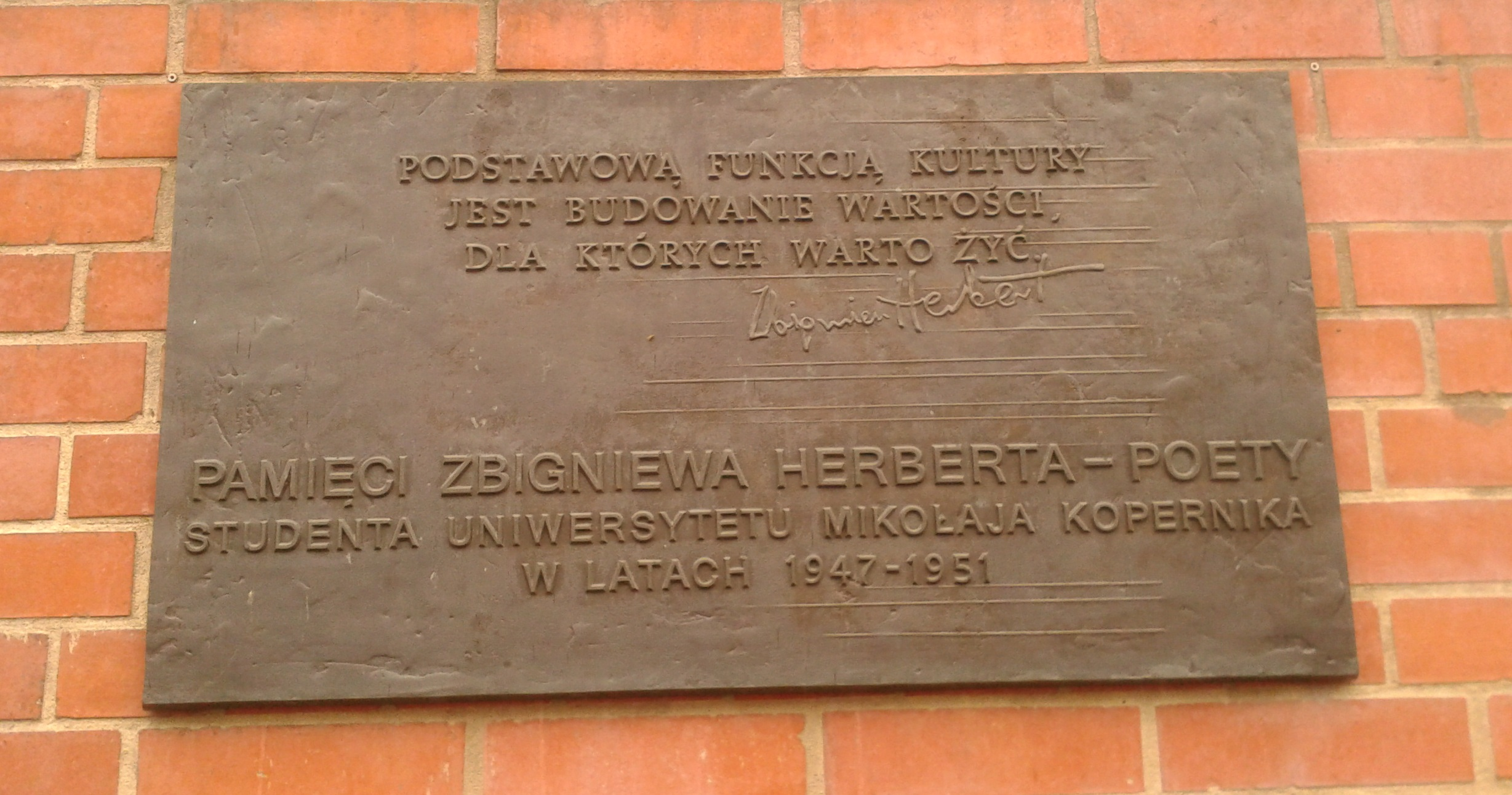 Tablica upamiętniająca Zbigniewa Herberta na Tablica na Collegium Maius Uniwersytetu Mikołaja Kopernika w Toruniu - ulica Fosa Staromiejska inskrypcja: Podstawową funkcją kultury/jest budowanie wartości/dla których warto żyć/Zbigniew Herbert/Pamięci Zbigniewa Herbert - poety/studenta Uniwersytetu Mikołaja Kopernika/w latach 1947-1951